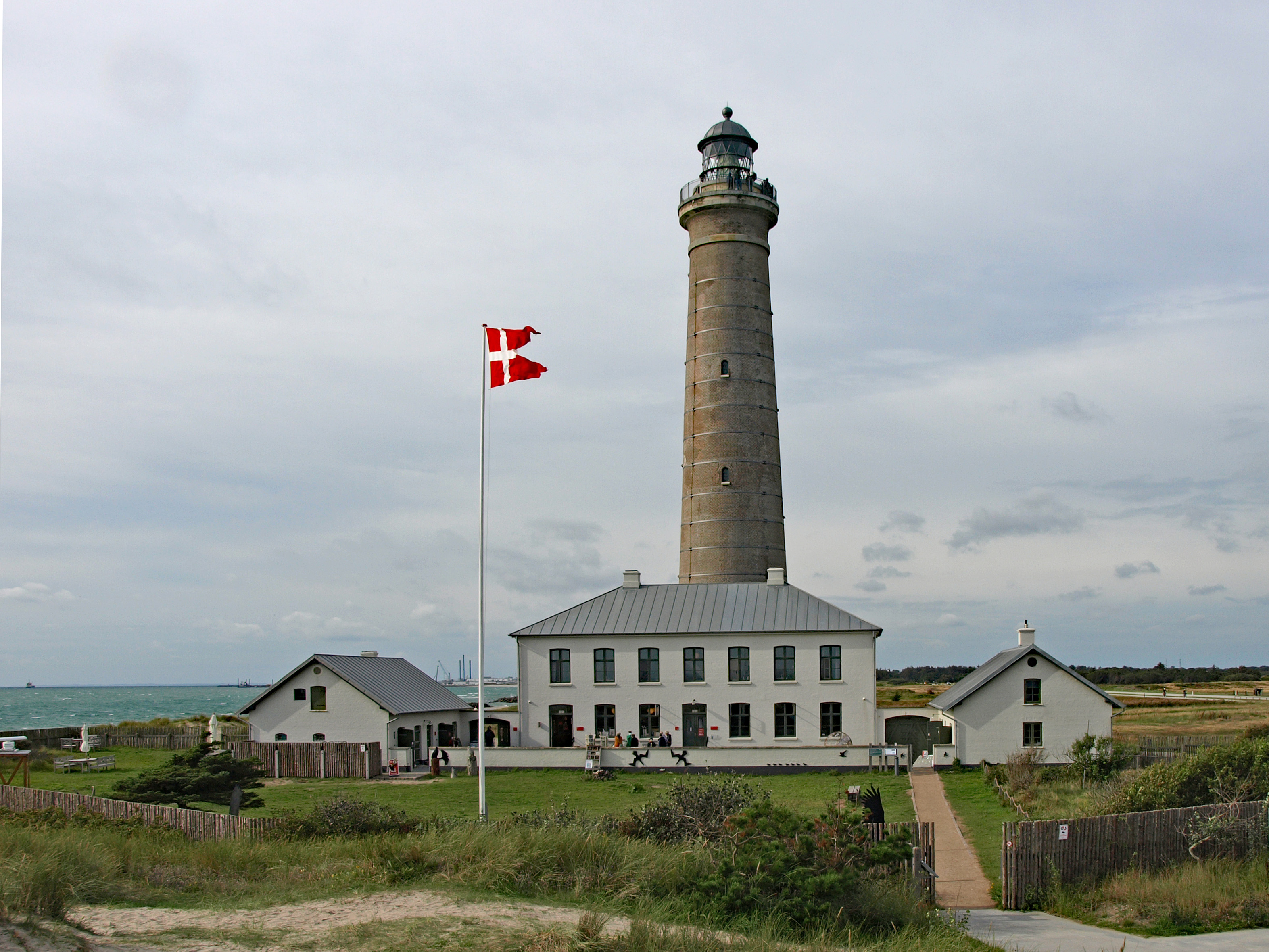 Leuchtturm Skagen Grå Fyr